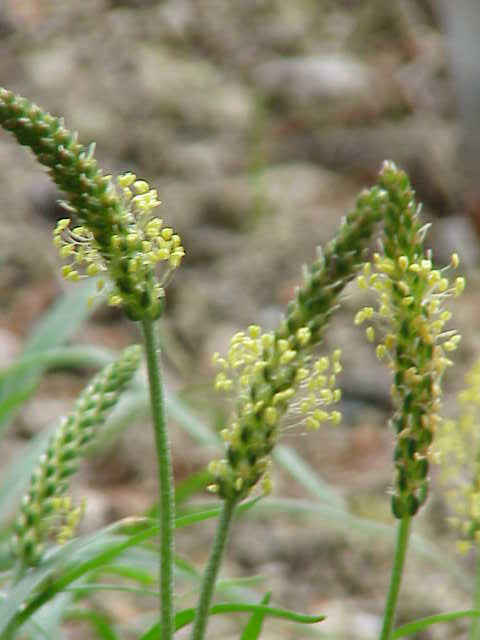 Species: Plantago alpina Family: Plantaginaceae Image No. 1